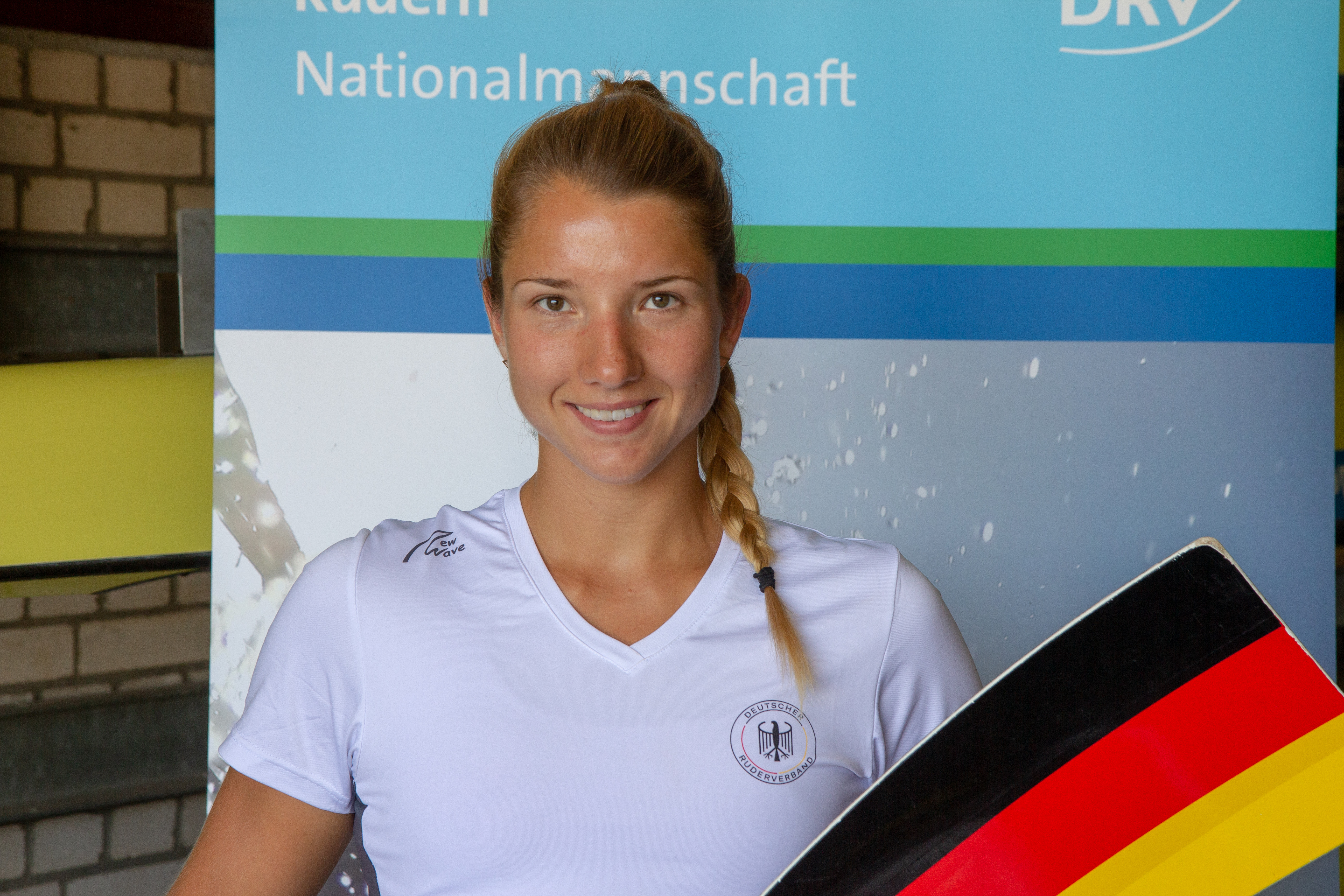 Charlotte Reinhardt bei Medientag des Deutschen Ruderverbandes in der Ruderakademie Ratzeburg am 22. August 2018.